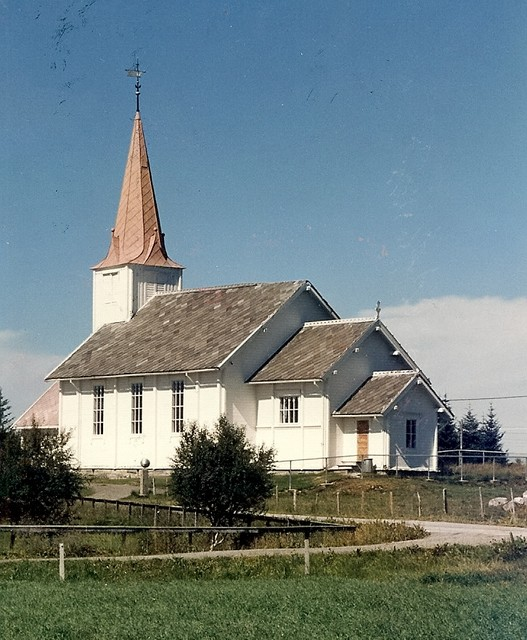 Edøy kirke